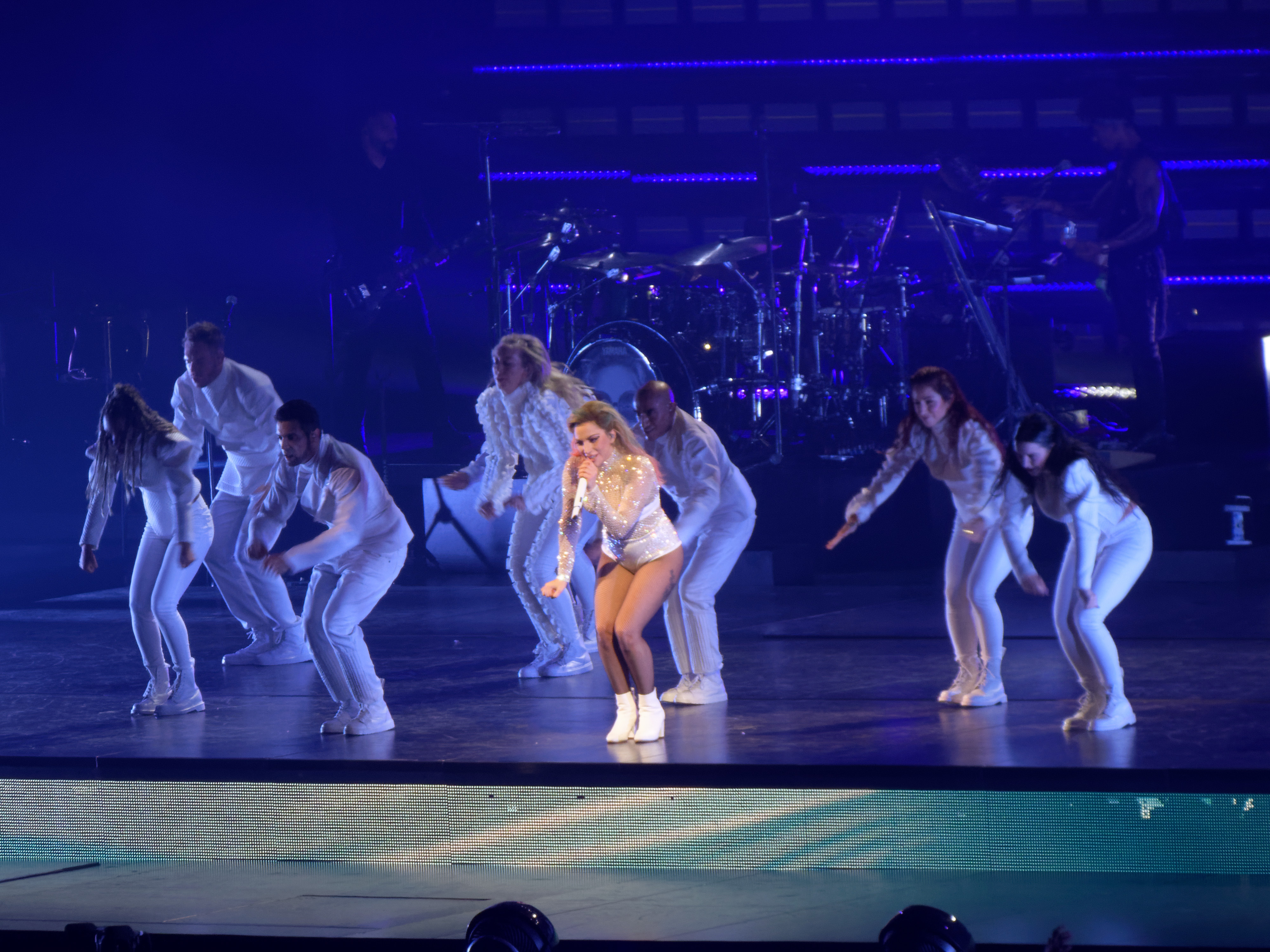 Lady Gaga performing "The Cure" at Joanne World Tour in Tacoma